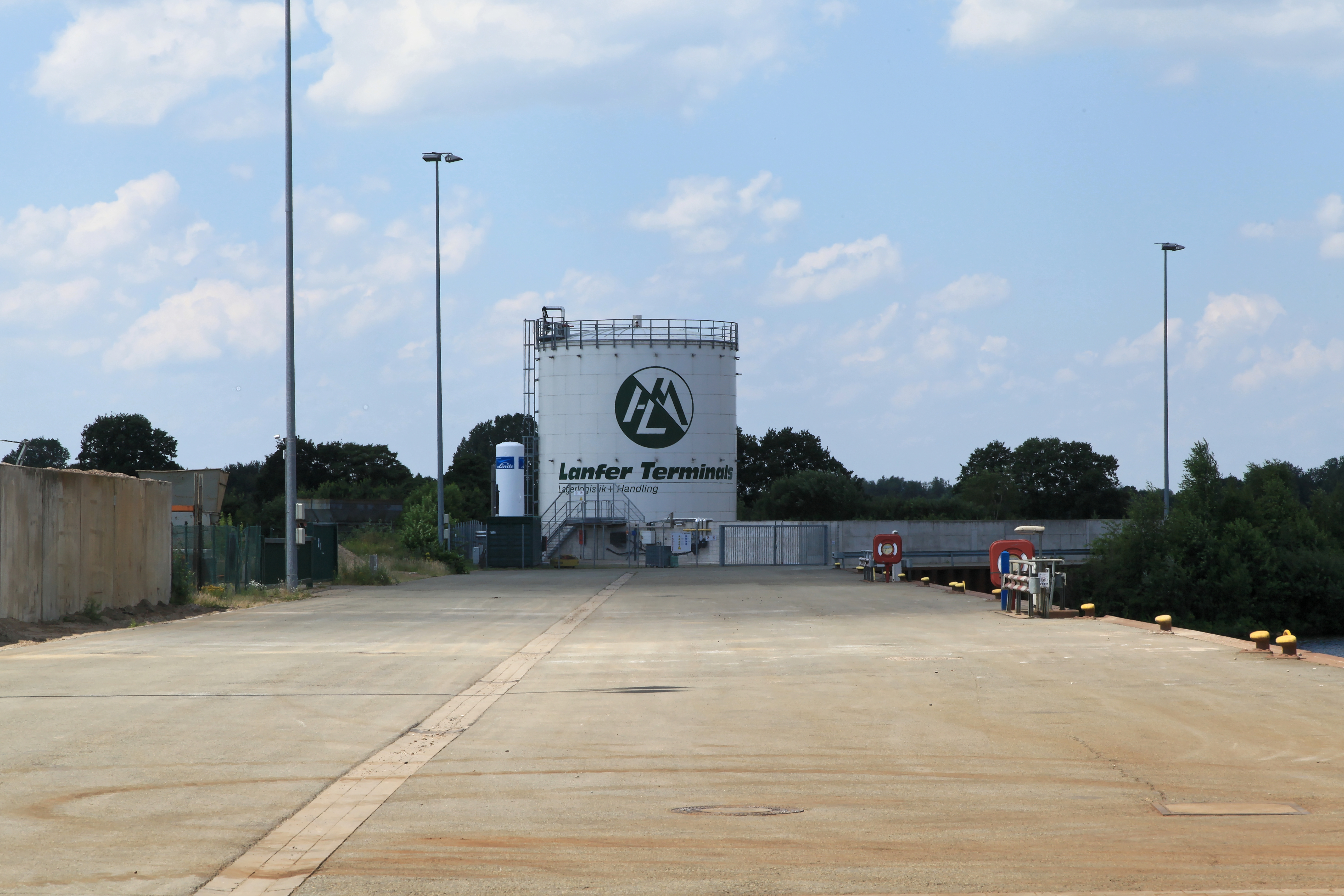 Eurohafen Emsland, Am Eurohafen in Haren (Ems)